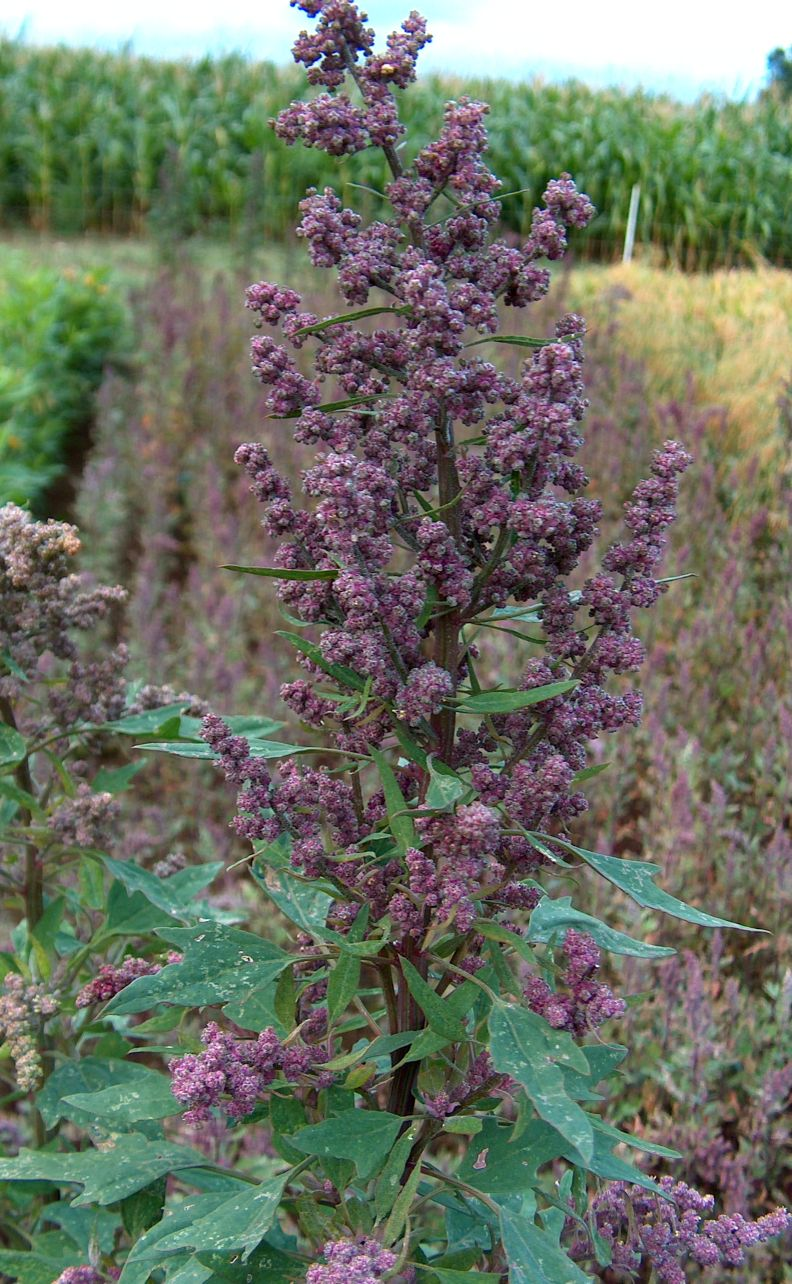 noch nicht reife und daher noch grüne Reismelde (Chenopodium quinoa)